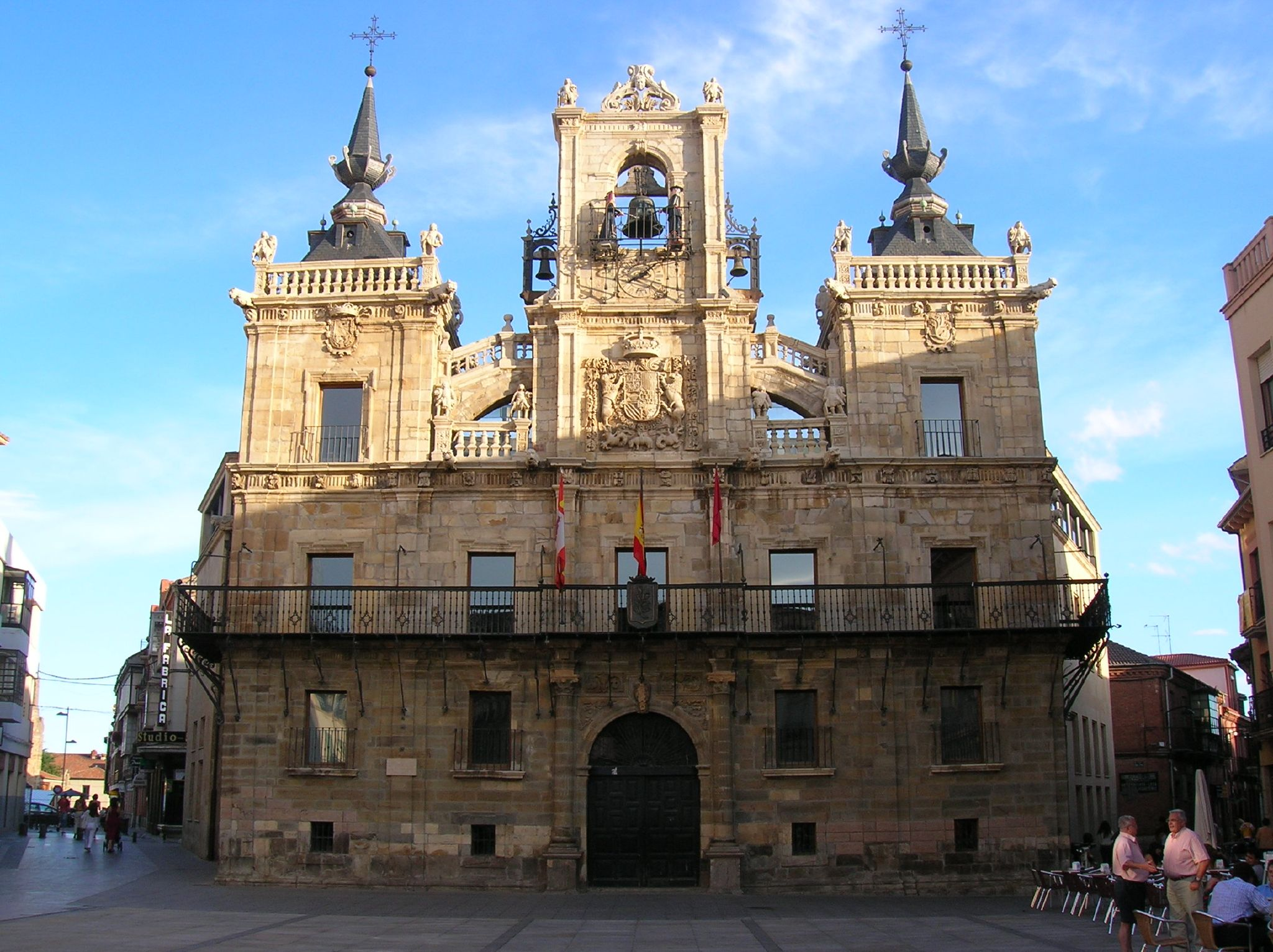 El Ayuntamiento de la capital de la comarca de la Maragatería, Astorga. En León.